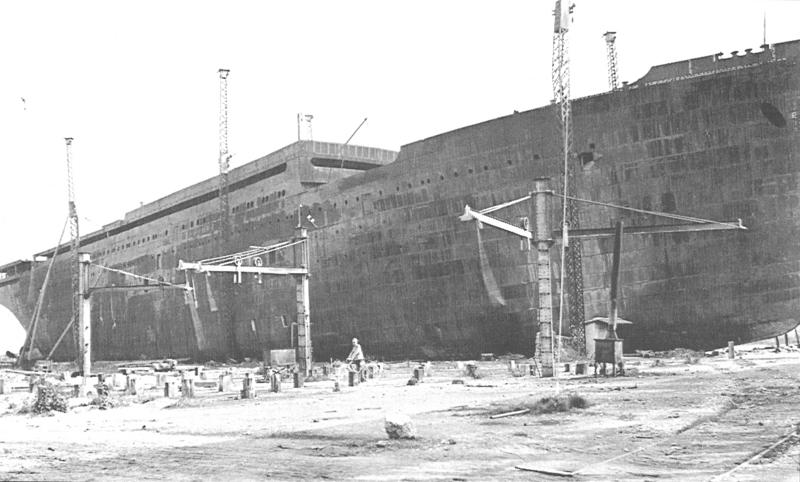 Die "Kaiserin Elisabeth" (15.500 t) der Austro-Americana, in der Werft von Monfalcone, wurde nie fertiggestellt. Der Rumpf wurde als Artilleriebeobachtungsstand verwendet.